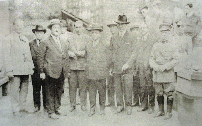 Visita de Getúlio Vargas a Caxias do Sul